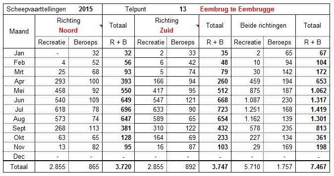 Scheepvaarttellingen Eembrug bij Eembrugge; gegevens via Bob van de Haar, Inspecteur Vaarwegen/Wegen, Wegendistrict (BEM)